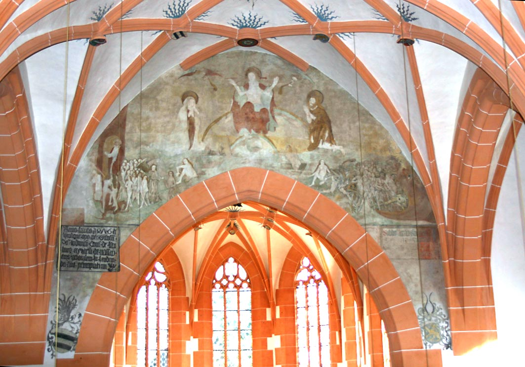 Die Marienkirche in Büdingen, Innenansicht - Deckengemälde: Das Jüngste Gericht.